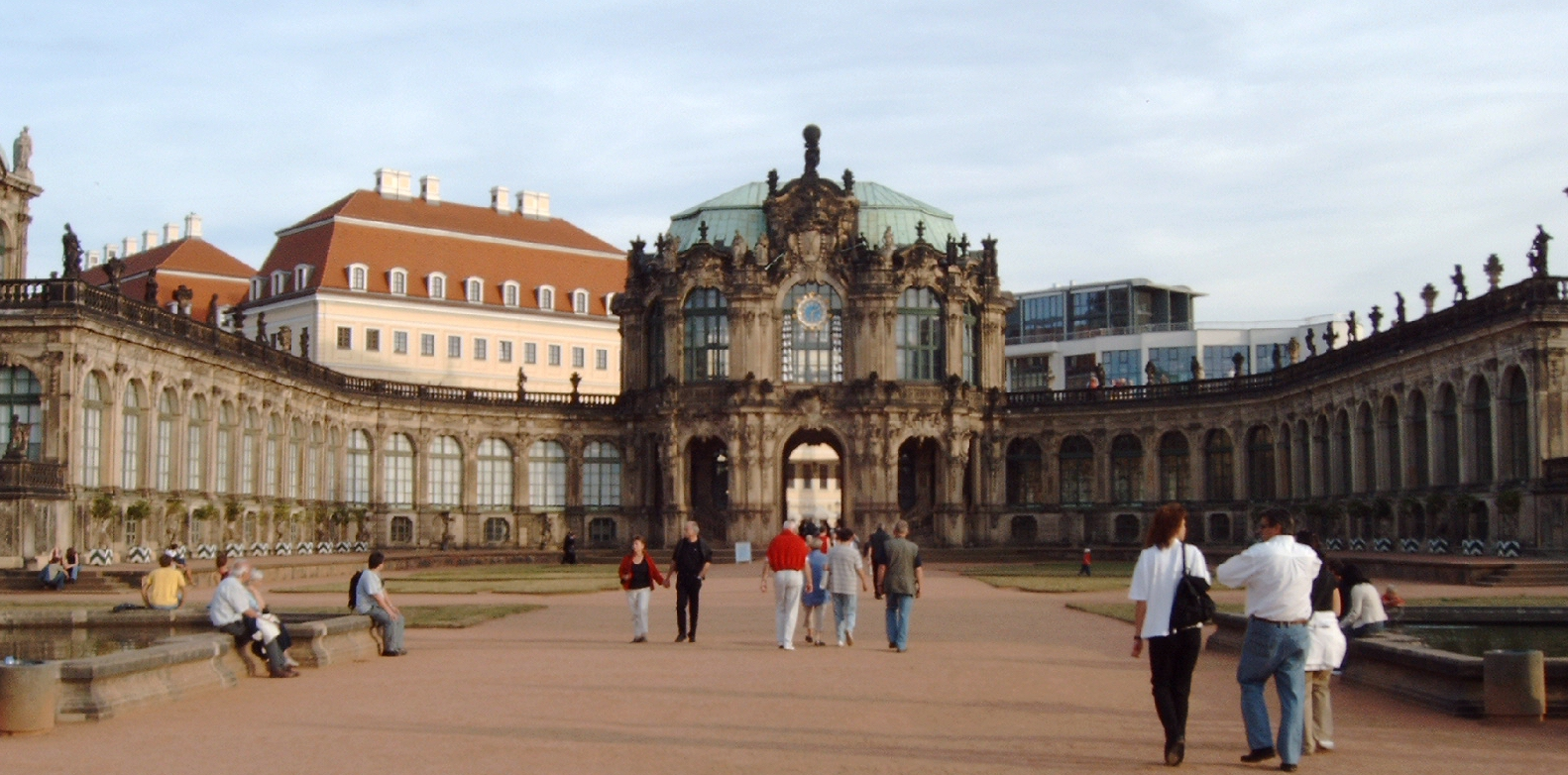 Der Dresdner Zwinger Aufnahme: August 2003 Url